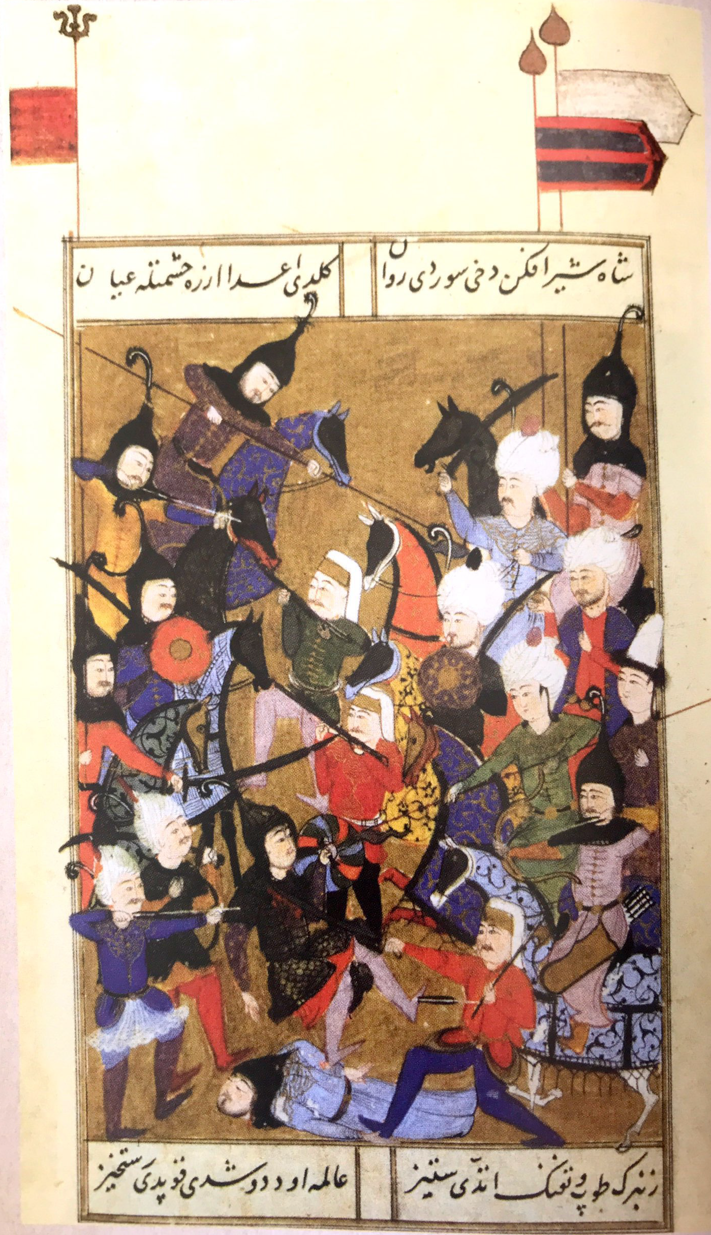 Çaldıran Muharebesi'nin Selimname'de yer alan minyatürü